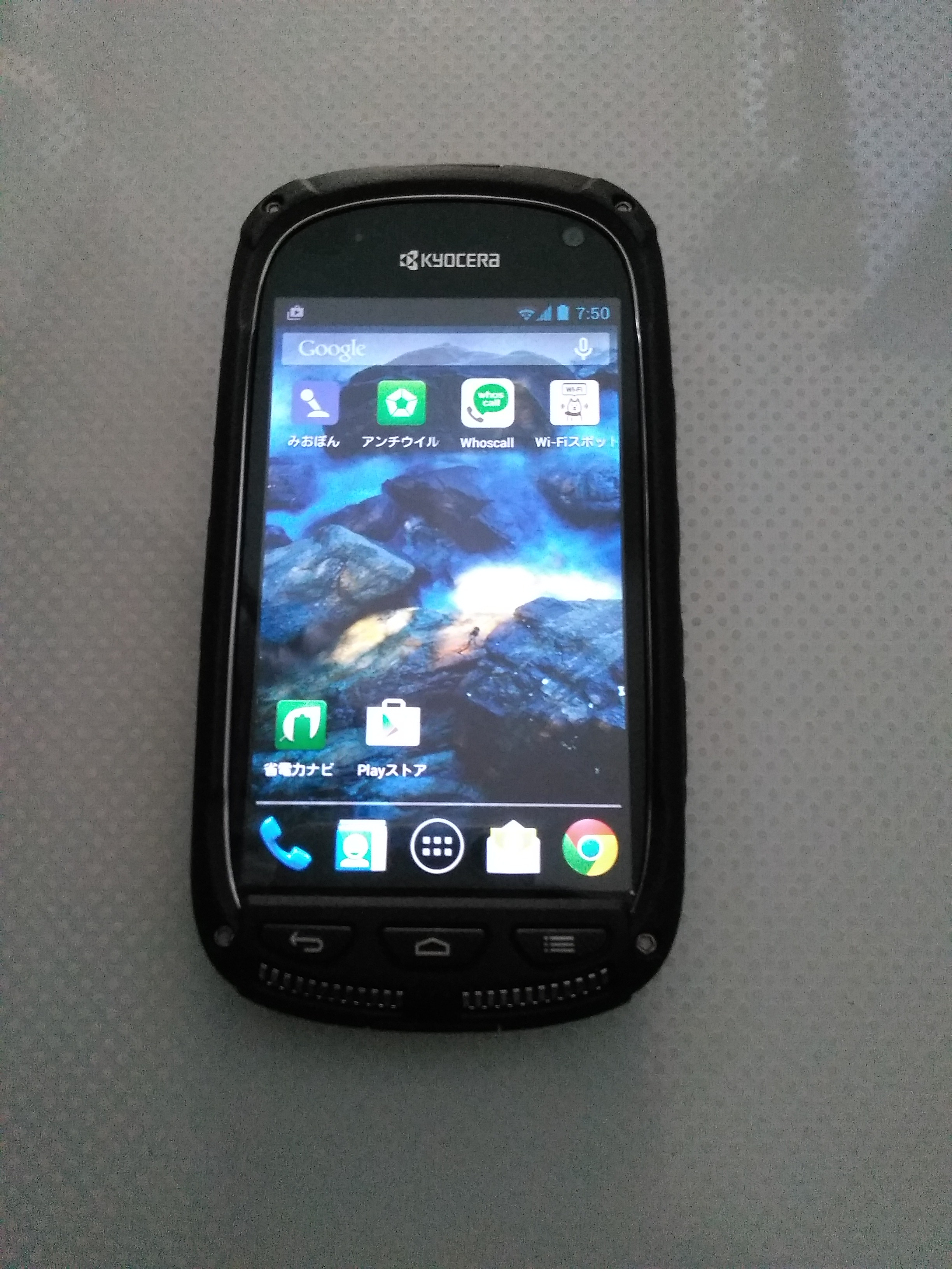 TORQUE SKT01のホーム画面